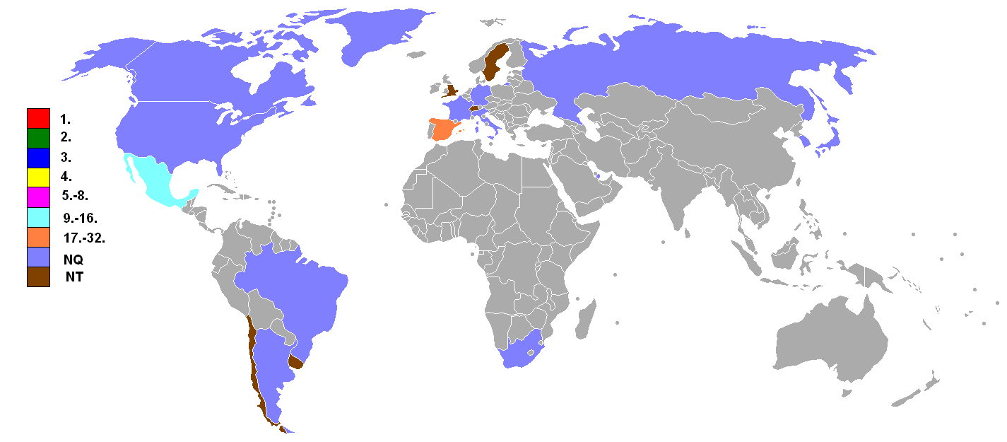 Beste Platzierungen der salvadorianischen Mannschaft in den Austragungsländern der FIFA-Fußballweltmeisterschaften